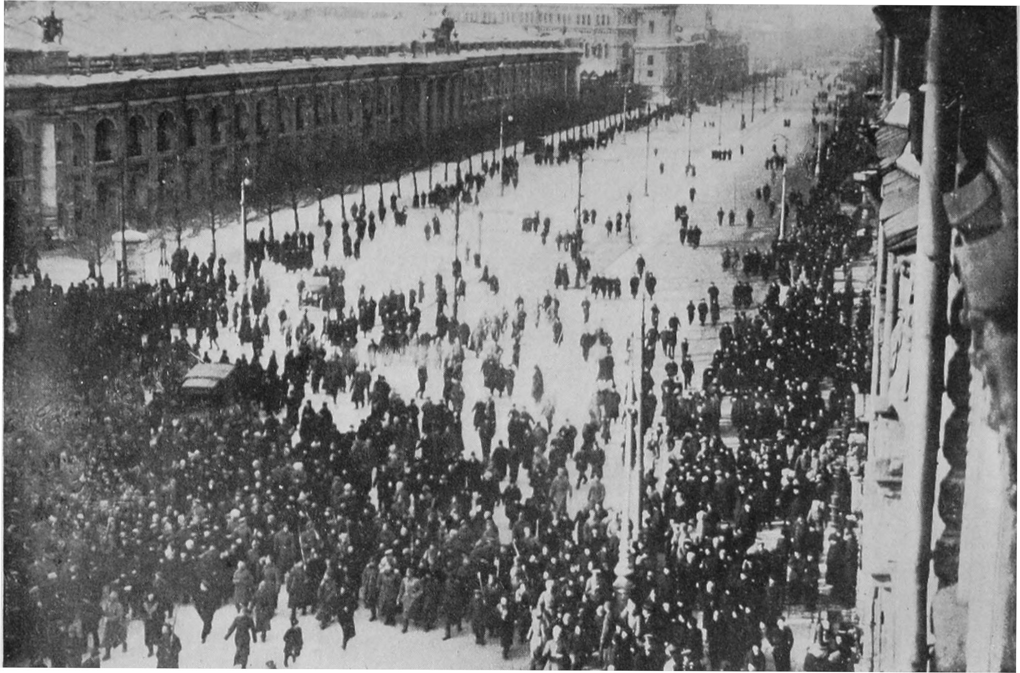 Manifestación en el Nevsky Prospekt, Petrogrado, marzo de 1917.